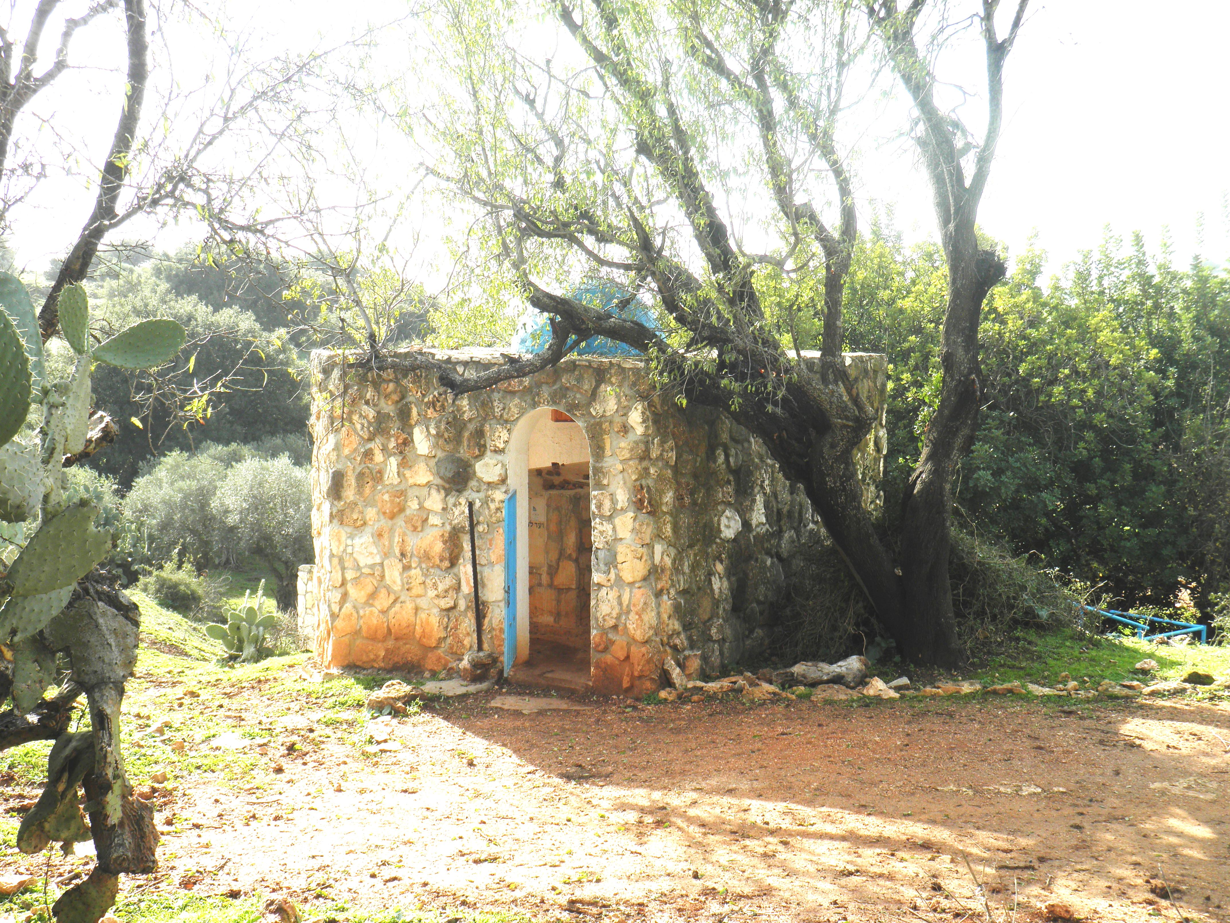 קבר התנא נחמיה העמסוני